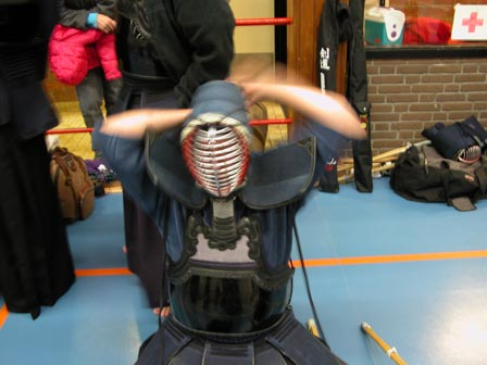 dit is een zelf gemaakte foto (van mezelf) uit eigen collectie